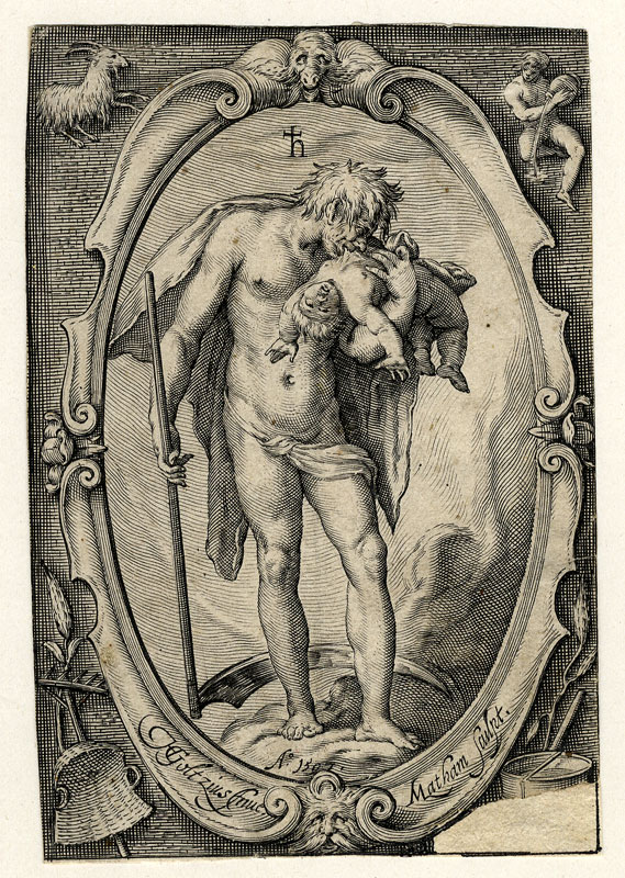 Planet Saturn, Kupferstich um 1600